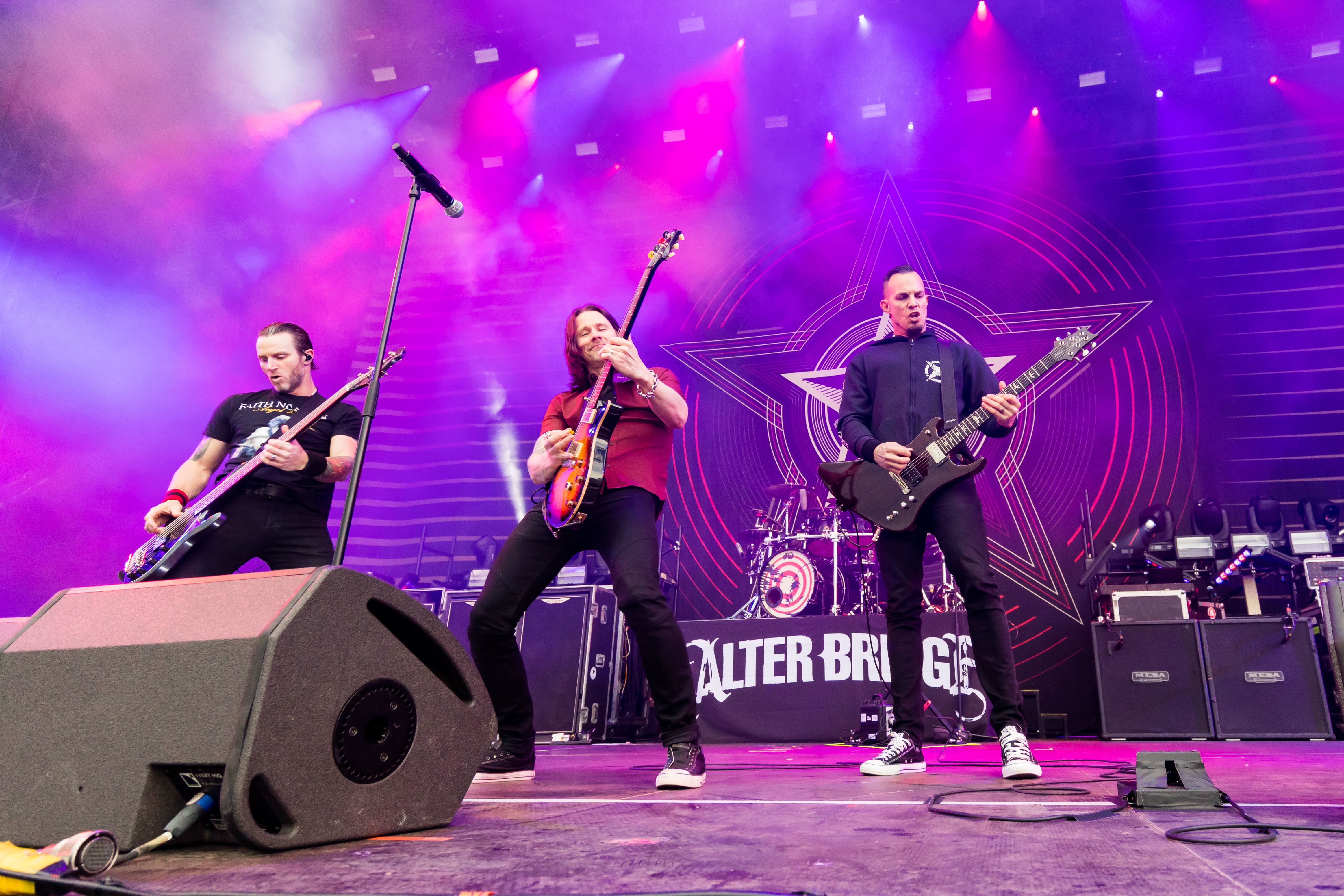 Alter Bridge during Rock am Ring at Nürburgring, Nürburg, Rheinland Pfalz, Germany on 2017-06-04, Photo: Sven Mandel